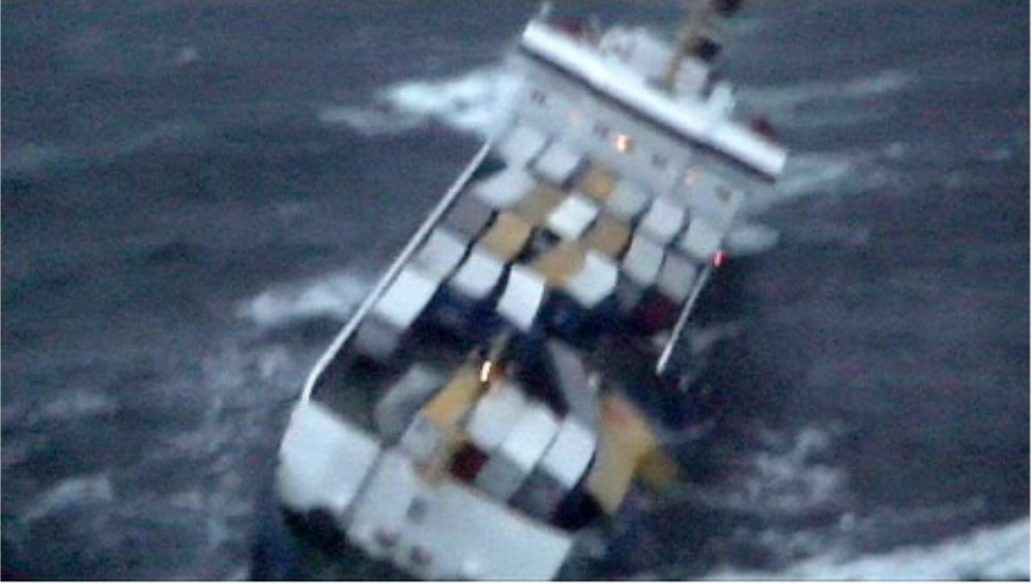 MV Finnbirch under lastförskjutning